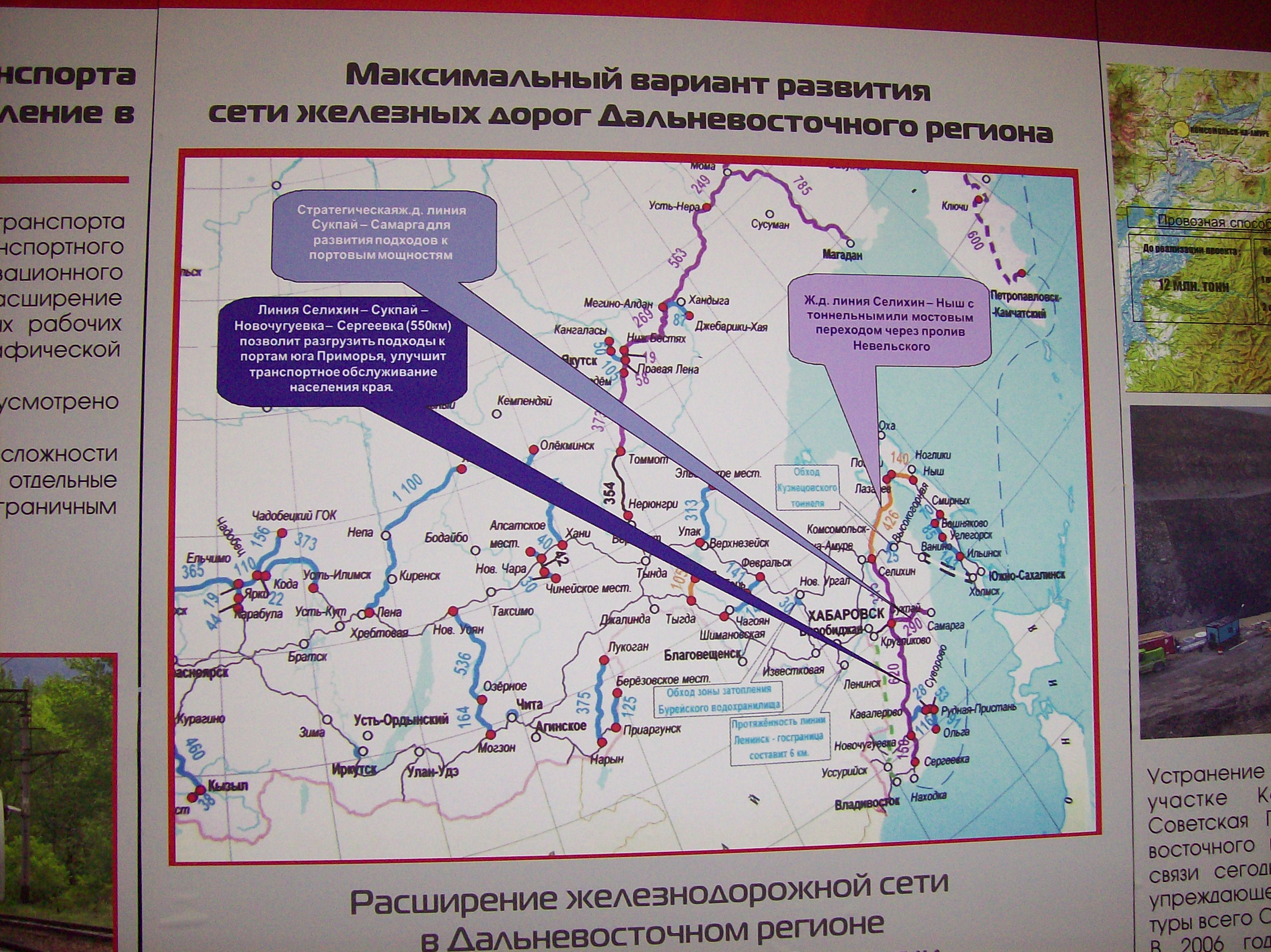 Международная выставка "Транспорт Дальнего Востока", Хабаровск, октябрь 2008 года. Программа Правительства Российской Федерации по развитию железнодорожного транспорта в Сибири и на Дальнем Востоке. Это фотография официального документа Правительства Российской Федерации, обнародованного на международной выставке. Авторские права на эту фотографию не распространяются. The international exhibition " Transport of the Far East ", Khabarovsk, October, 2008. The program of the Government of the Russian Federation on development of a railway transportation in Siberia and in the Far East. It is a photo of the official document of the Government of the Russian Federation promulgated at the international exhibition. Copyrights to this photo do not extend.